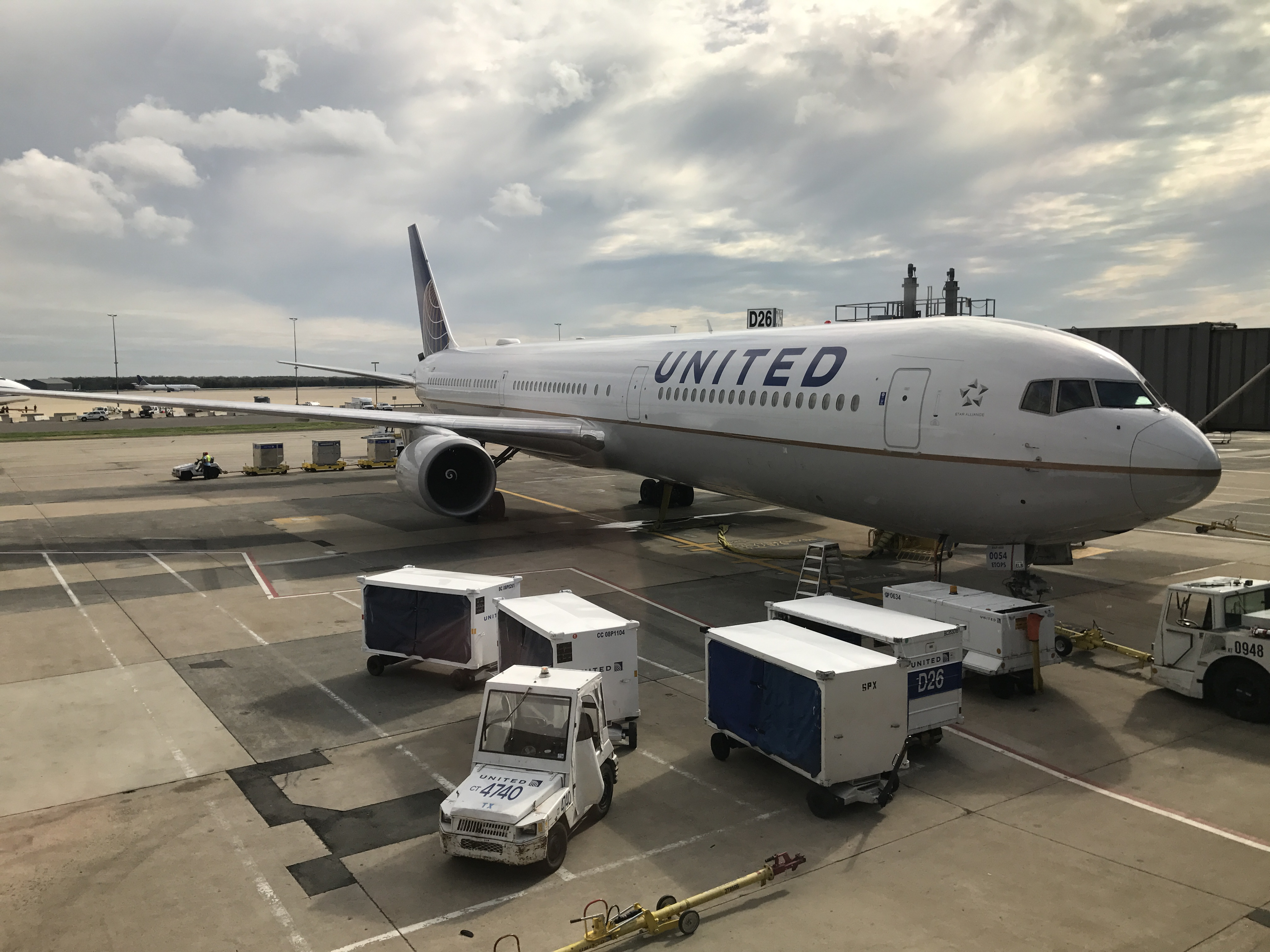 Avión de United Airlines en el Aeropuerto Internacional de Washington Dulles.